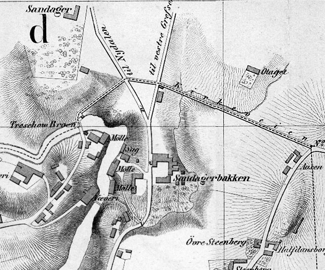 Kart over Sandaker i Østre Aker, 1861.